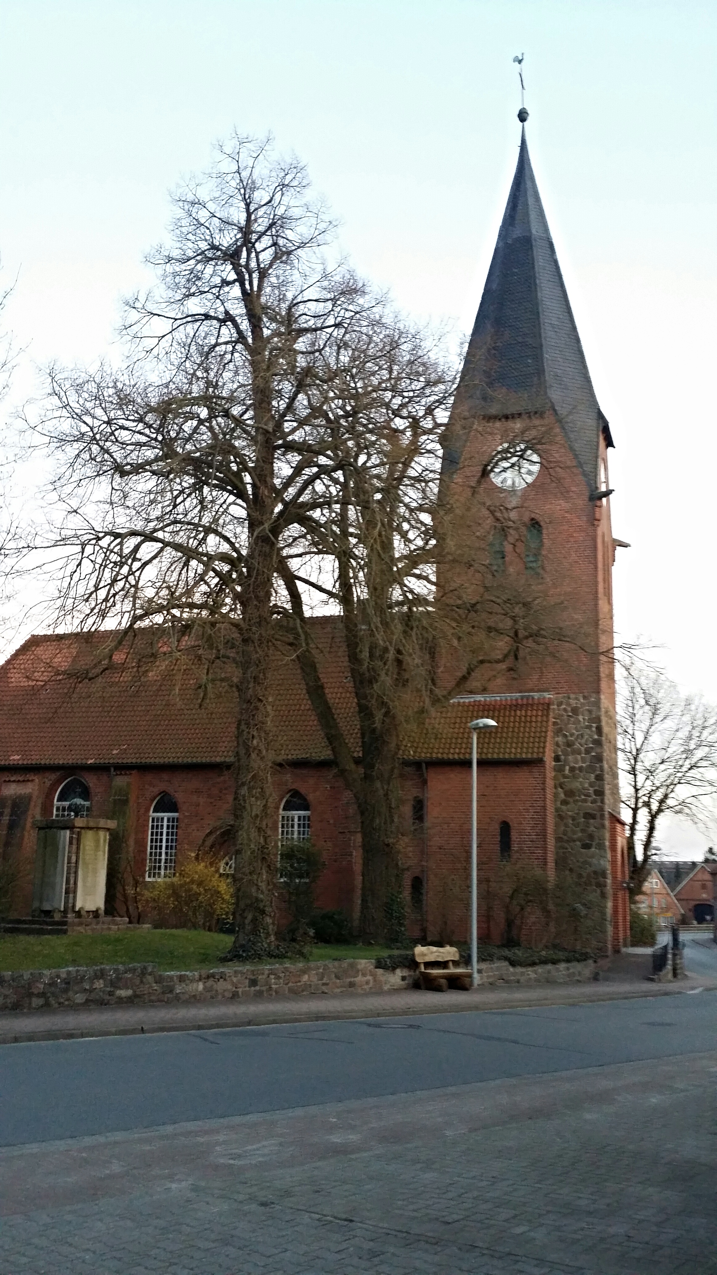 Kirche